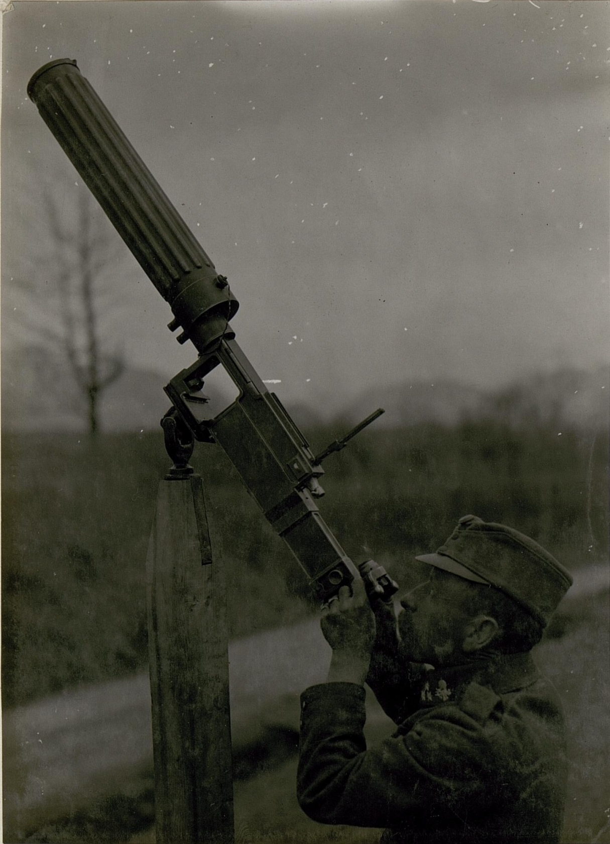 Fliegerabwehrstand für Fiat Revelli M.G.